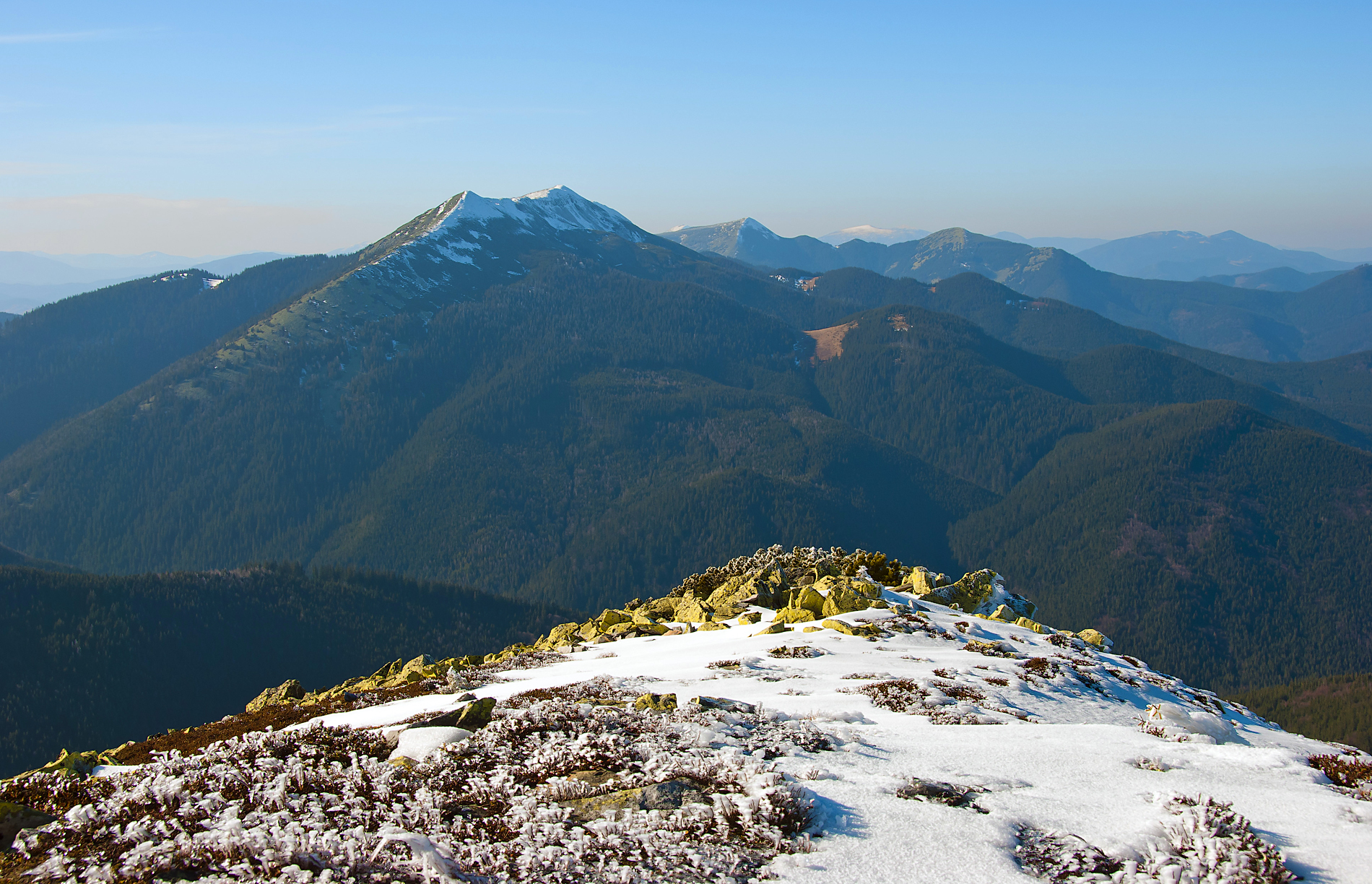 «Горгани», Надвірнянський район, Бистрицька та Зеленська сільські ради